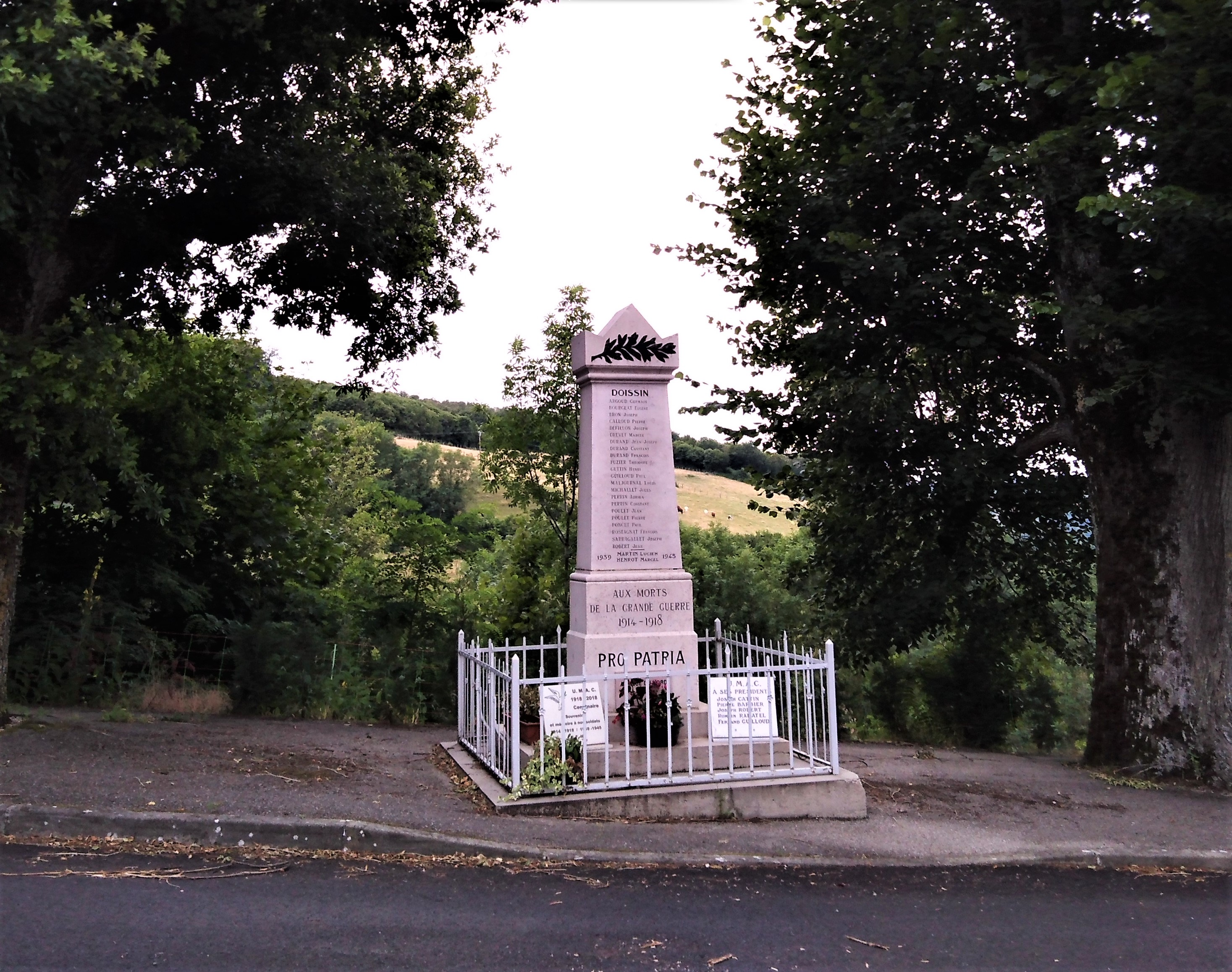 Monument aux morts de Doissin en juillet 2019